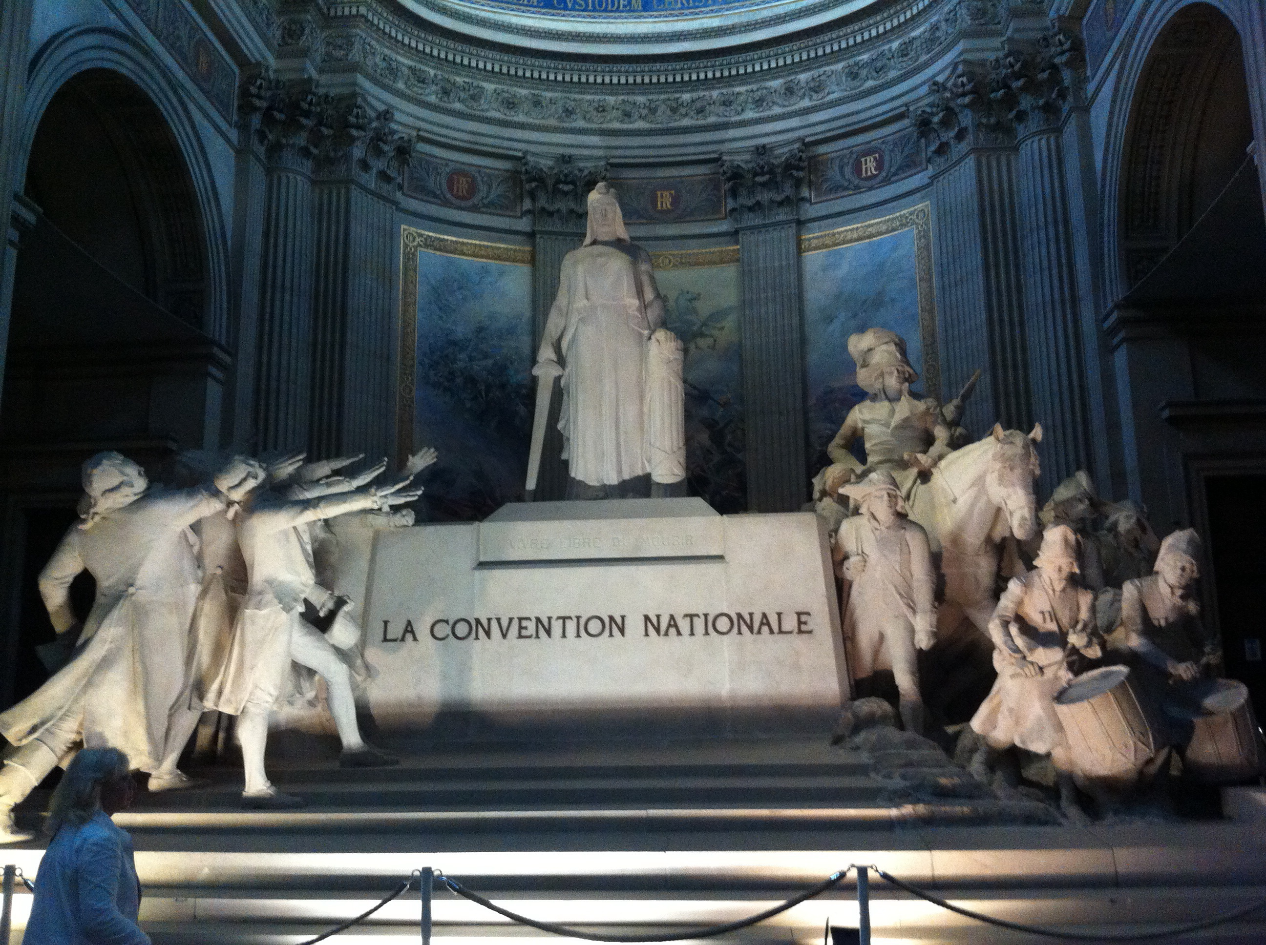 A Convención Nacional de Francia